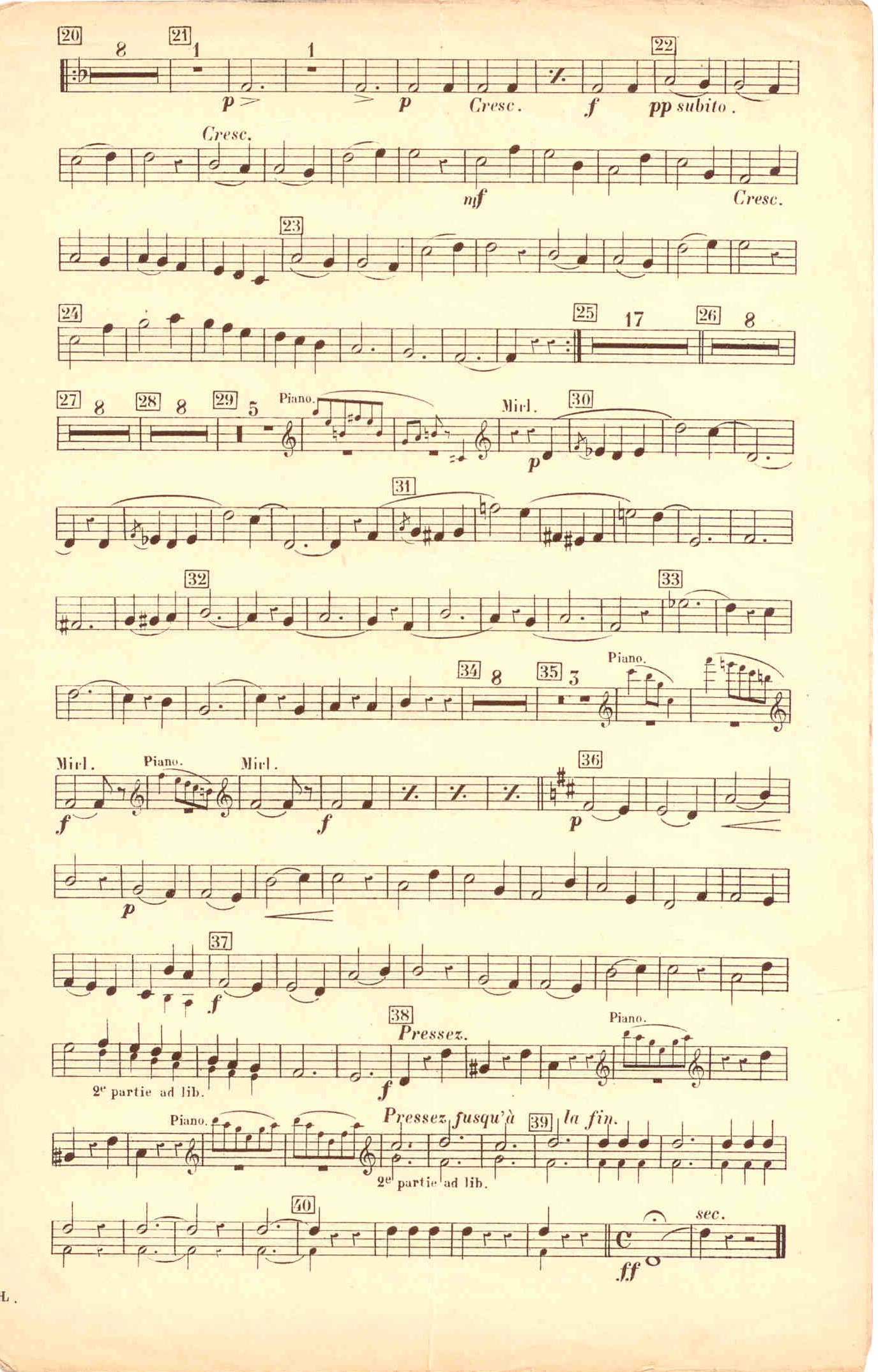 Page 2 sur 2 de la partition pour mirlitons ou bigophones de la Valse burlesque d'Émile Pessard, opus 95, imprimée à compte d'auteur fin XIXème siècle (ne figure pas dans le catalogue Opale+ de la Bibliothèque nationale de France).